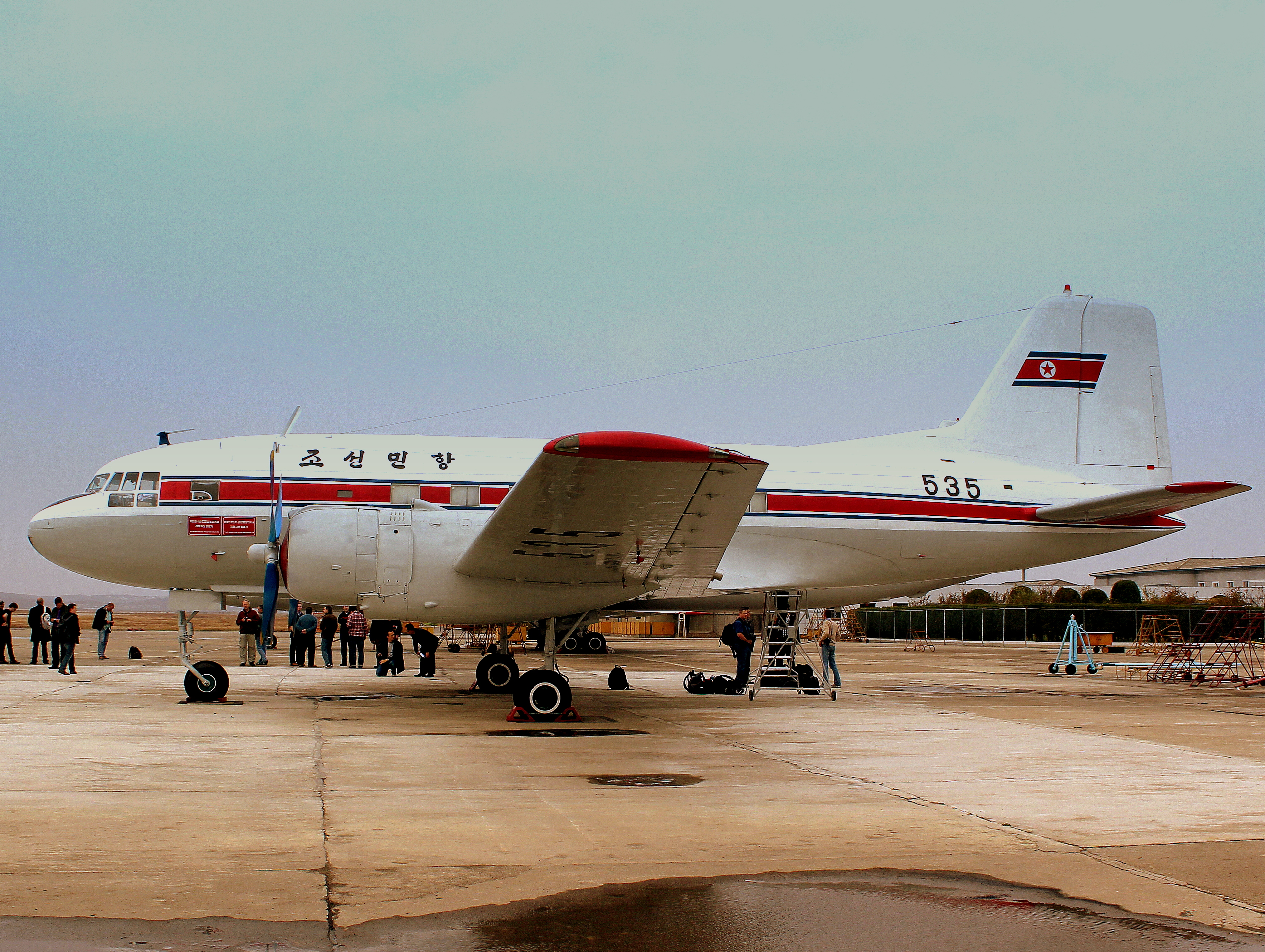 AIR KORYO IL14 P535 BEAUTIFULLY RESTORED AT SUNAN AIRPORT DPR KOREA OCT 2012